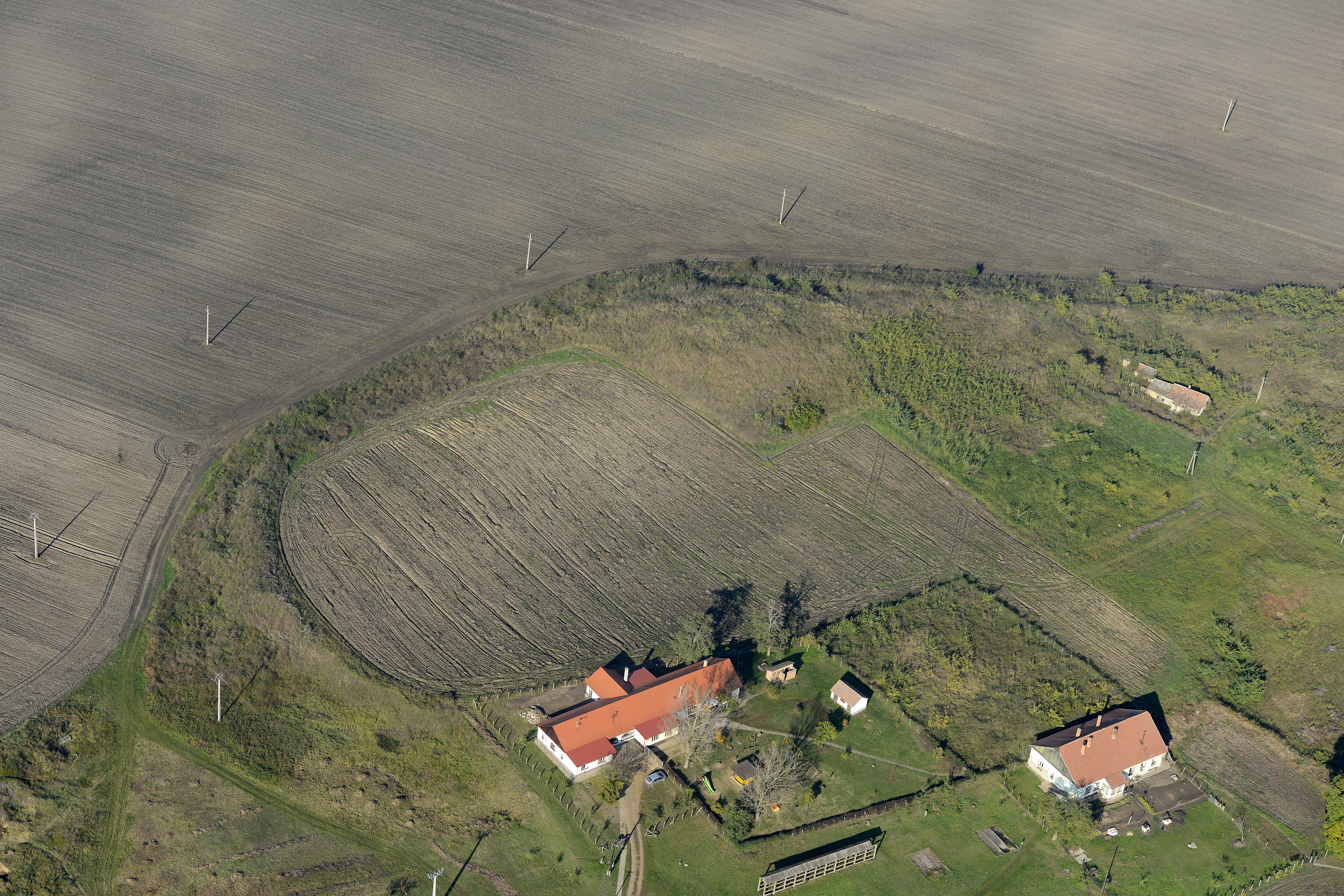 Egyek-Telekháza várhely - légi felvétel